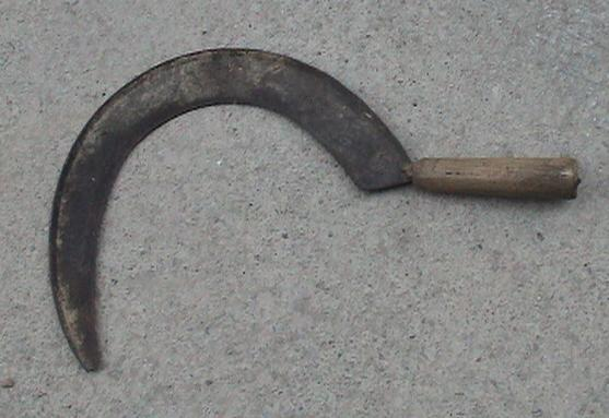 Sichel